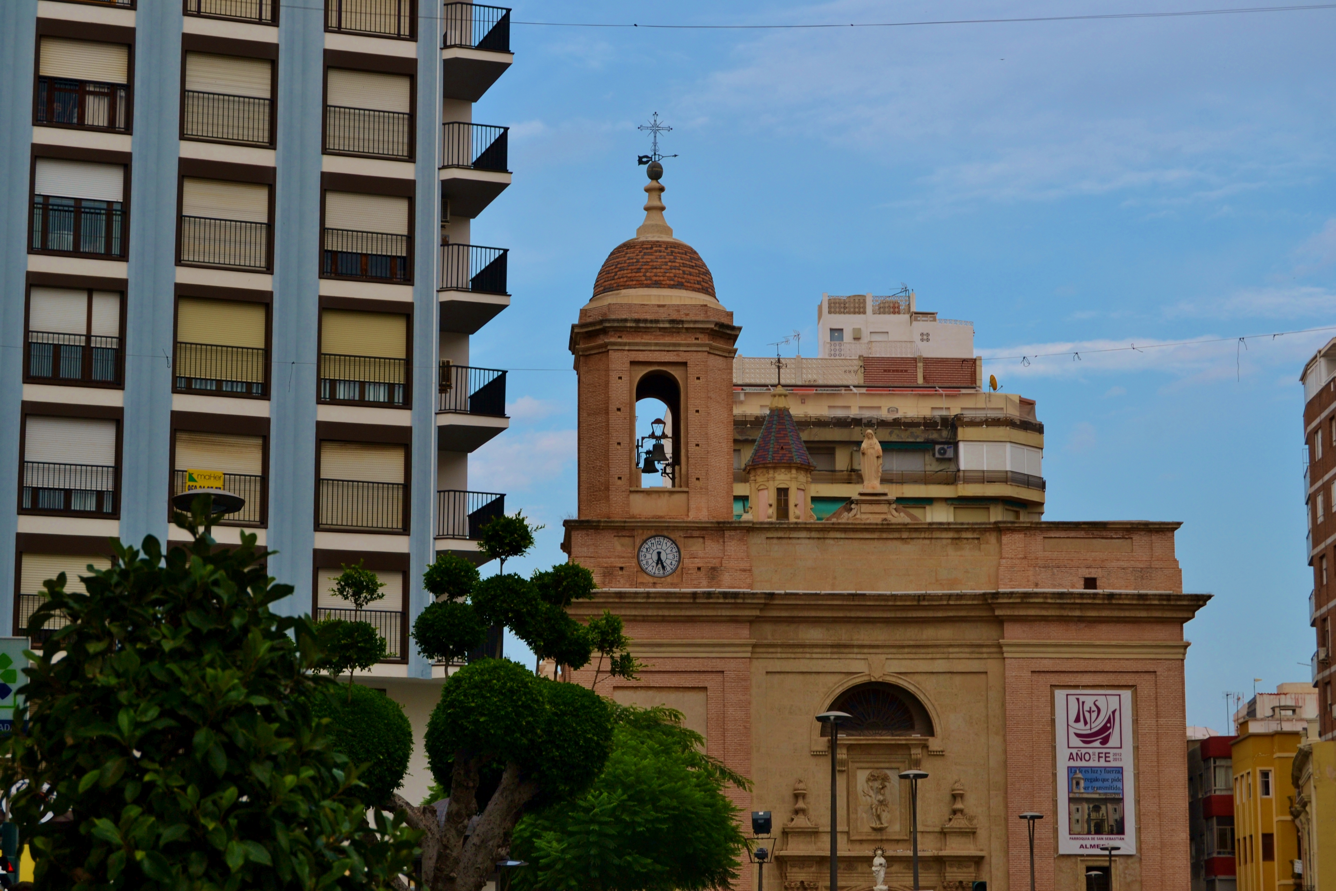 Iglesia de San Sebastián, Almería